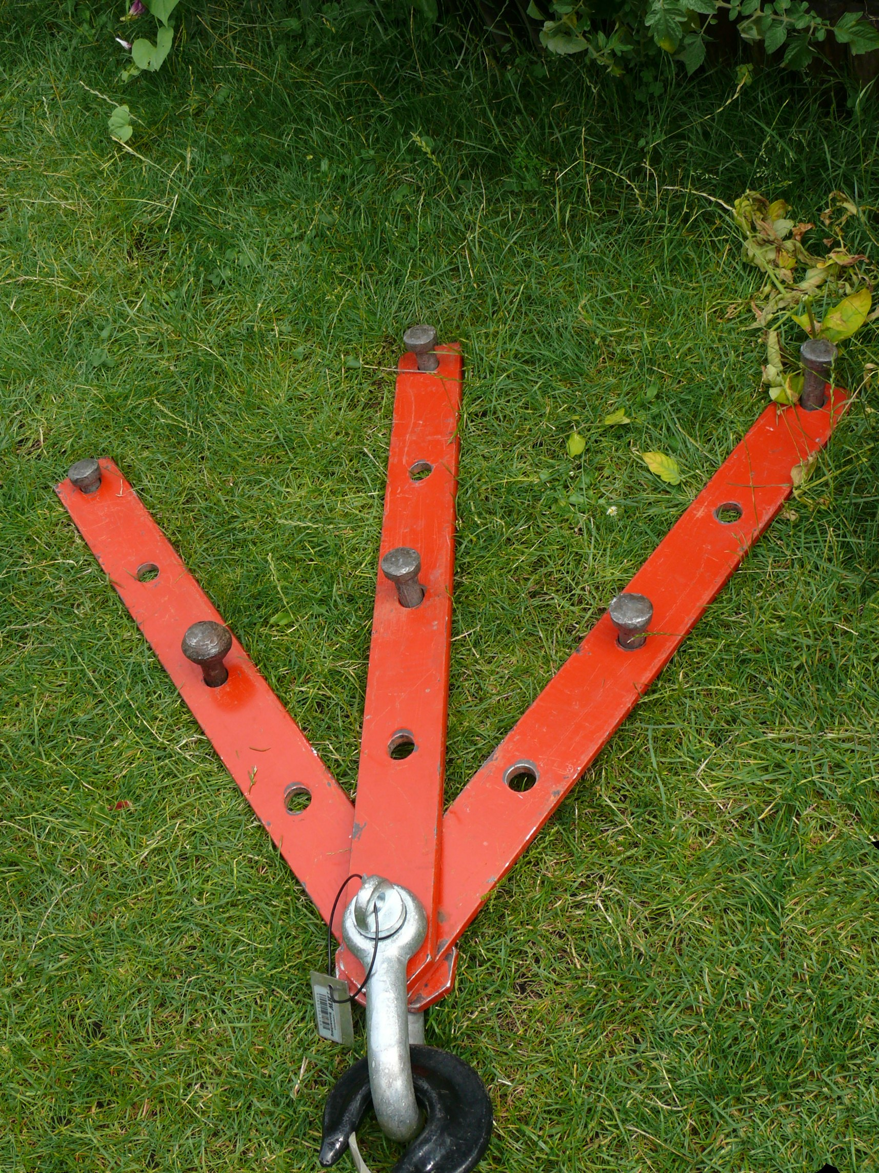 Erdanker (komplett) bestehend aus Laschenanker, Schäkel und mehreren Erdnägel